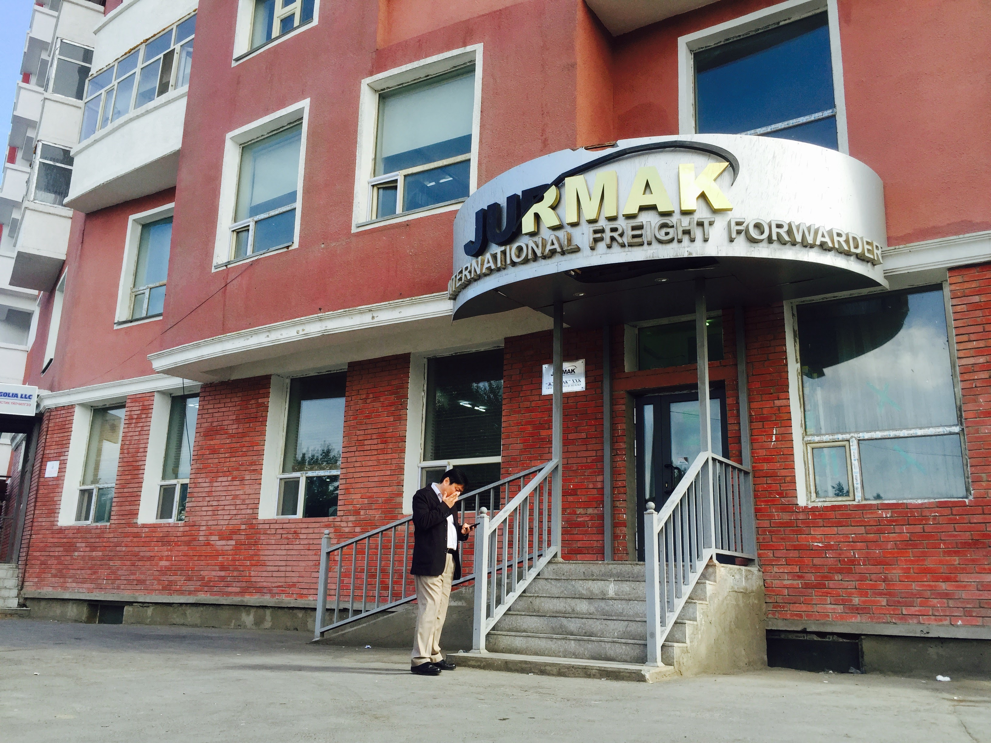 Монгол: Оффисын гадна талын зураг.